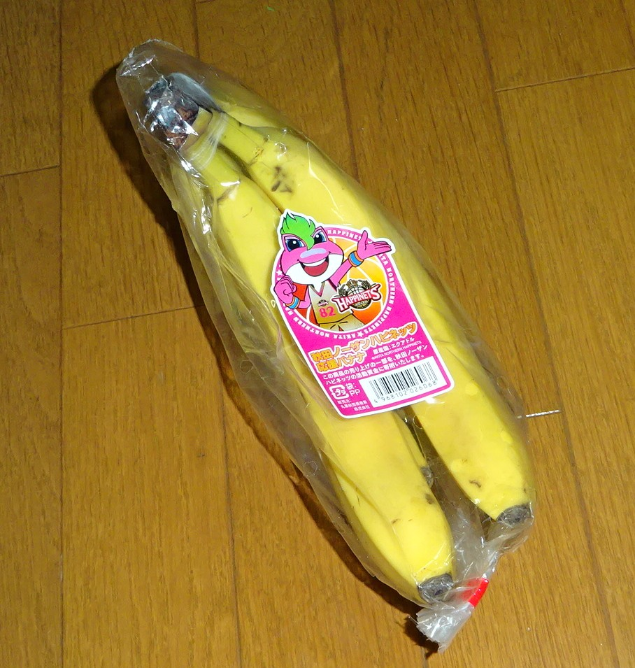 Happinets Banana